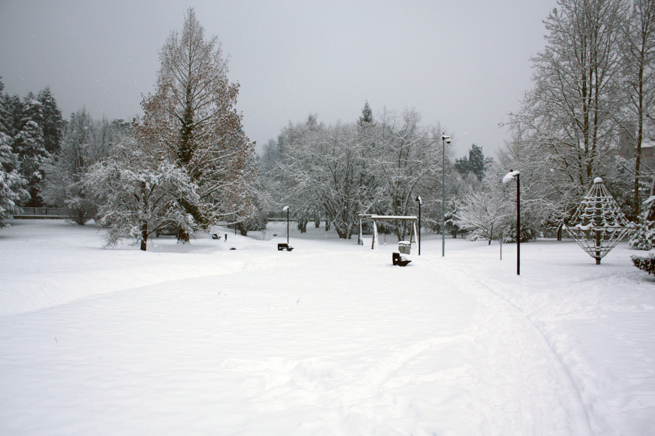 "Venegono Superiore" Parco Pratone sotto la neve